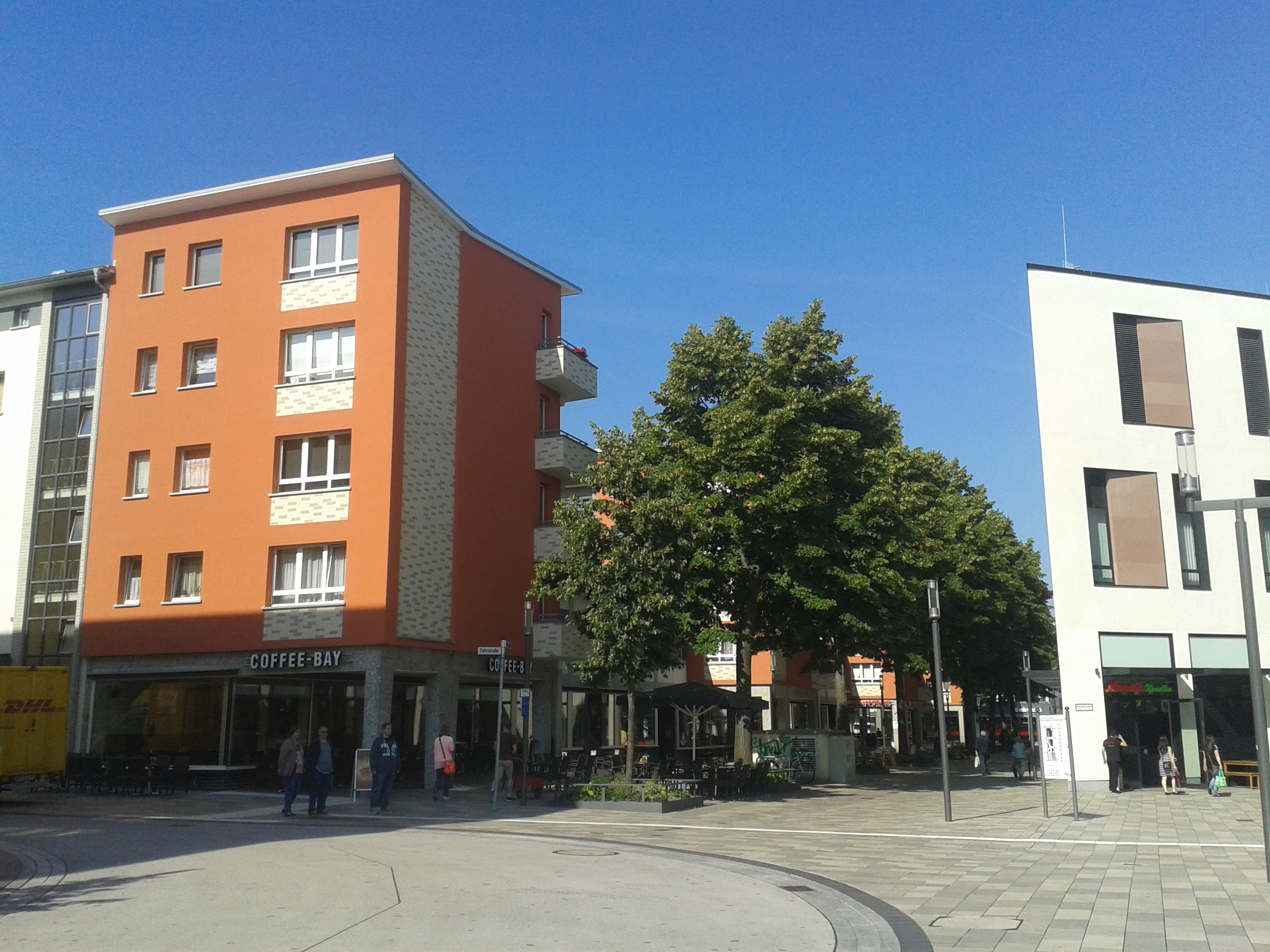 Freiheitsplatz